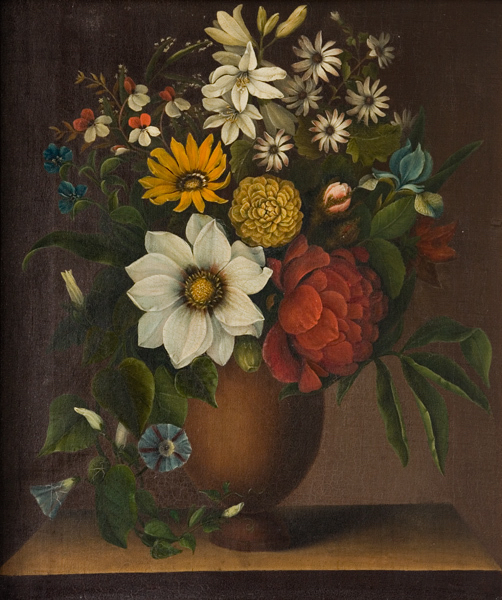 Vase med blomster, gouache af Magdalene Bärens. Statens Museum for Kunst, København